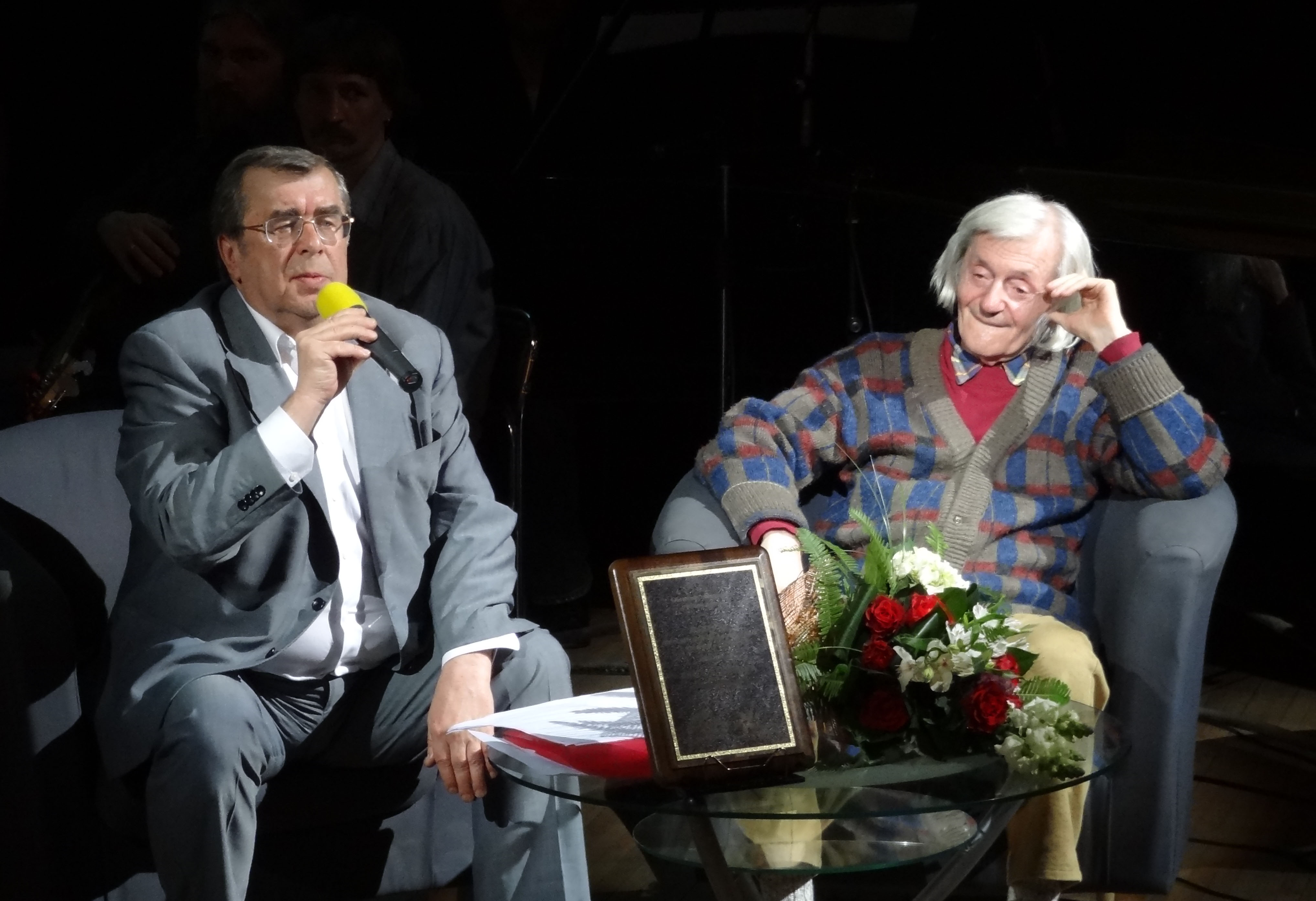 На торжественной церемонии вручения российской национальной премии «Поэт». Москва, 2011 год. Сергей Иванович Чупринин и лауреат премии 2011 года Виктор Александрович Соснора.